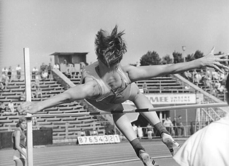 Burglinde Pollak Zentralbild Wendorf-1.8.69 Berlin: XX. Deutsche Leichtathletik-Meisterschaften der DDR im Friedrich-Ludwig-Jahn-Sportpark. Im Fünfkampf der Frauen steuert Burglinde Pollak (SC Potsdam) einen neuen DDR-Rekord zu. Beim Hochsprung segelte sie im Fosbury-Flop über 1,65 m (Foto) und verbesserte ihre Bestleistung gleich um neun Zentimeter.